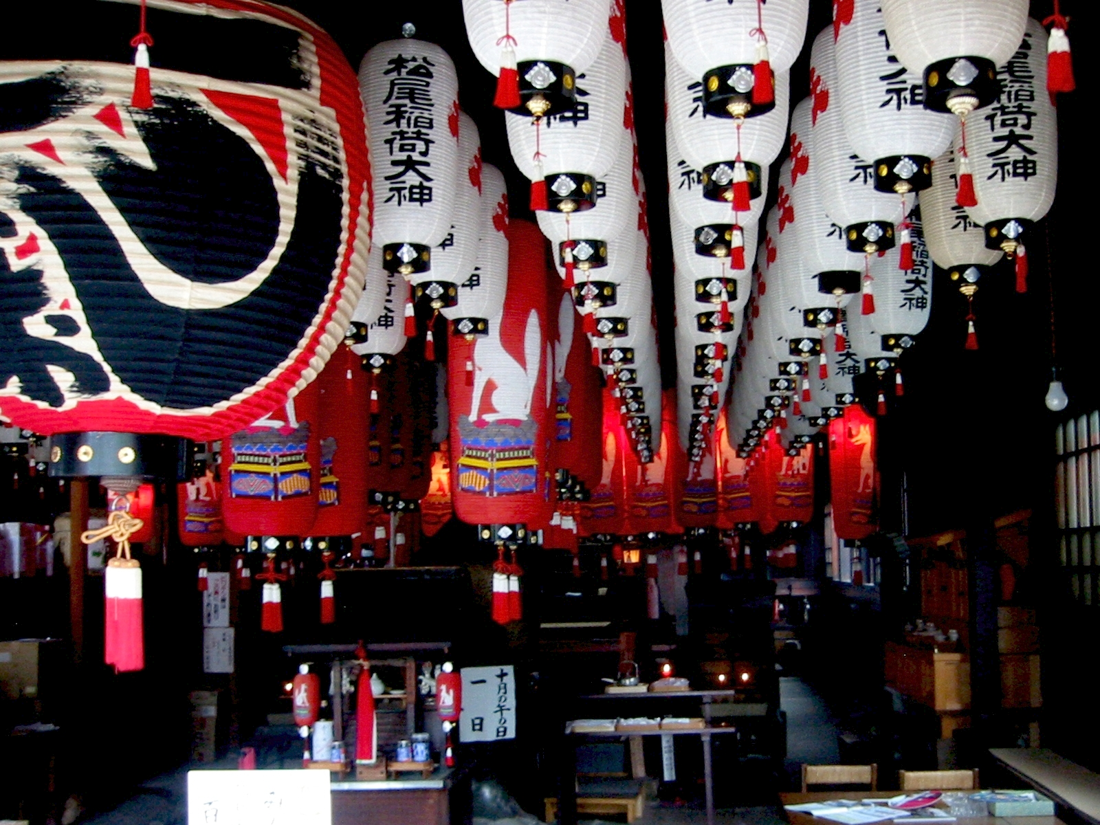 神戸、松尾稲荷神社にて 堤燈。